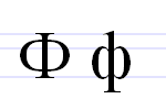 Cyrylicka litera Ф.